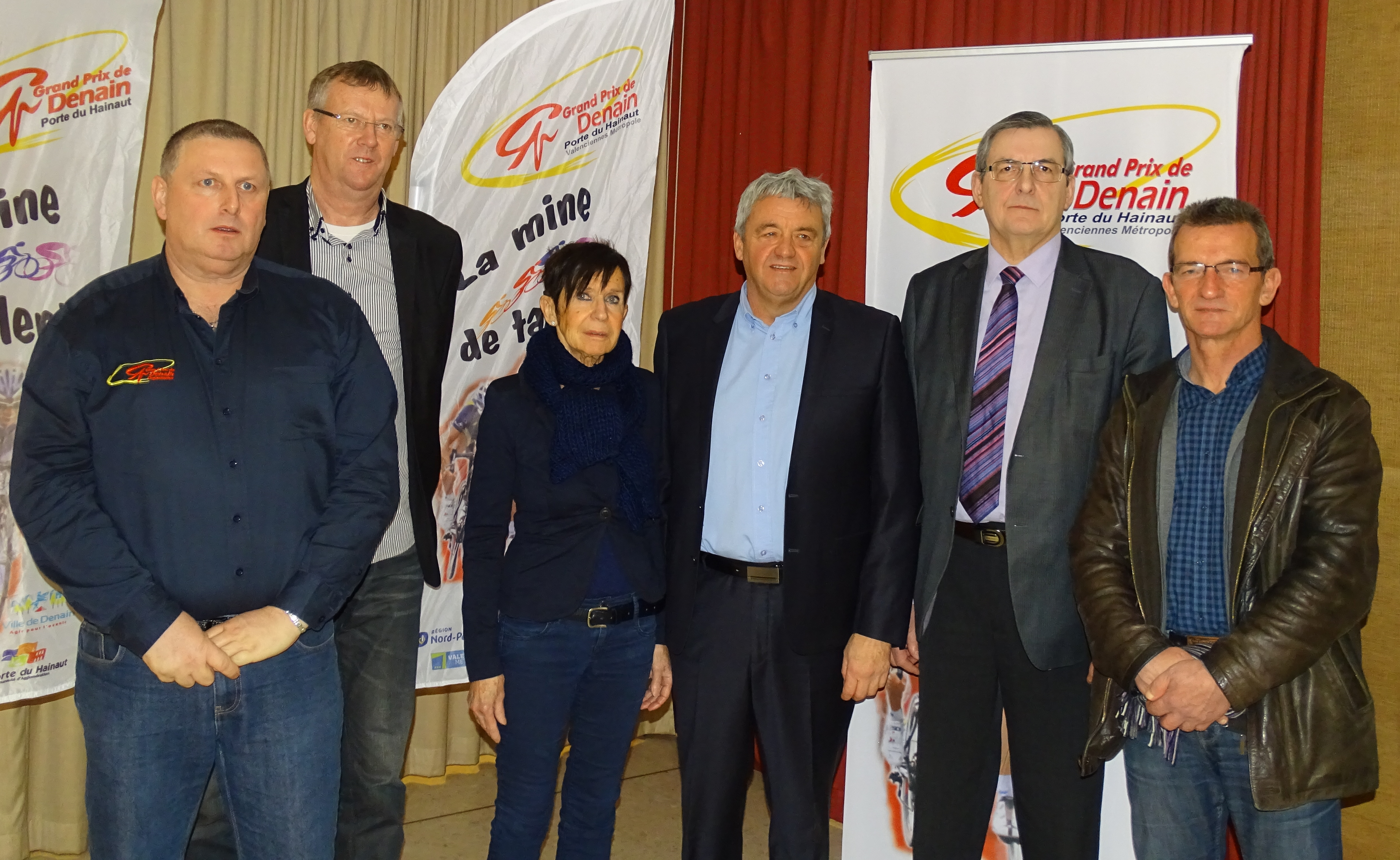 Conférence de presse de l'édition 2016 du Grand Prix de Denain le samedi 13 février 2015, à partir de 11 heures, dans la salle Aragon, à Denain, Nord, Nord-Pas-de-Calais-Picardie, France.